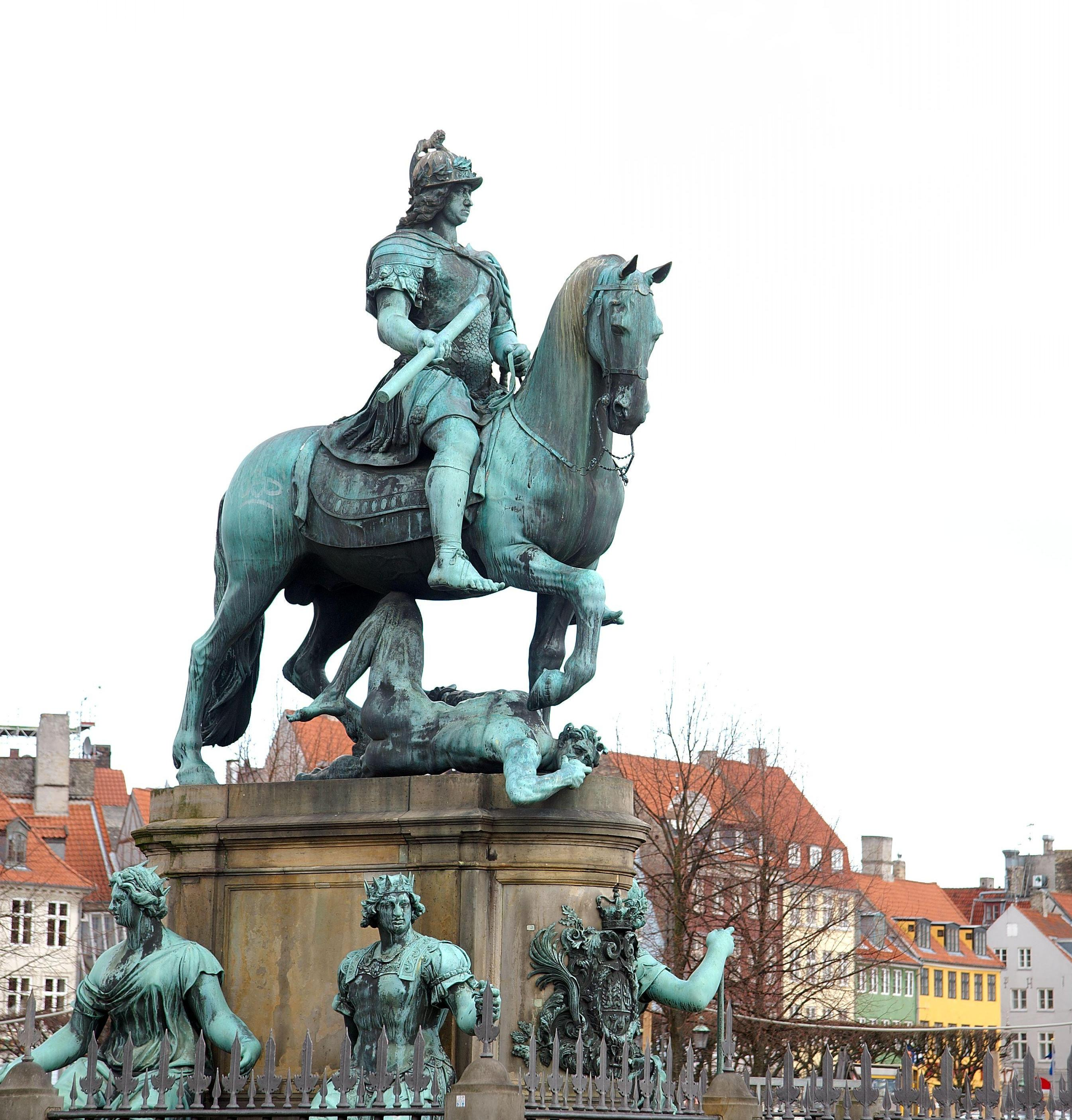 Kong Christian Vs statue fra 1688 på Kongens Nytorv. Kunstner: den franske billedhuggeren Abraham-César Lamoureux